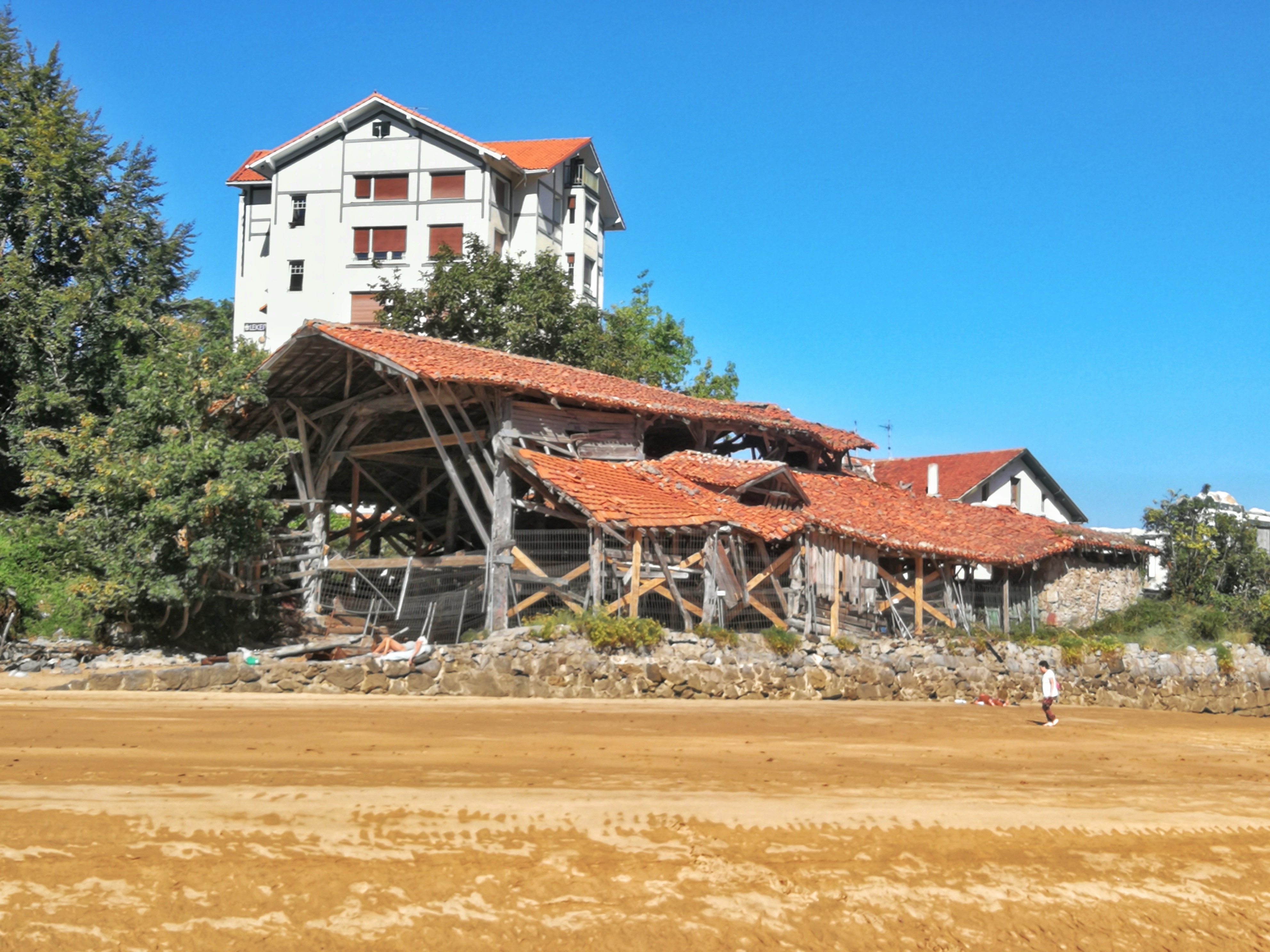 Mendieta ontziola